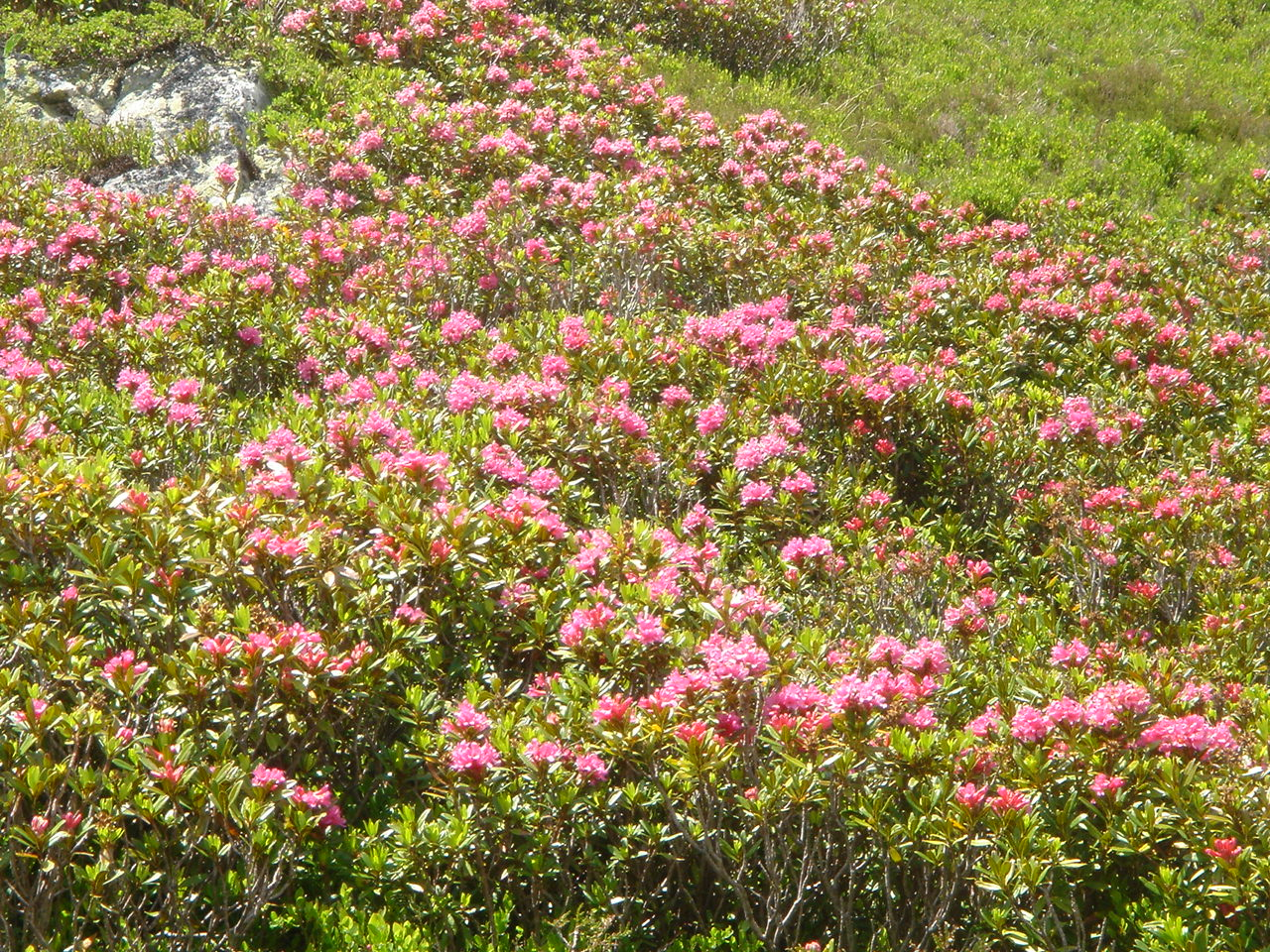 Rhododendron ferrugineum habitat